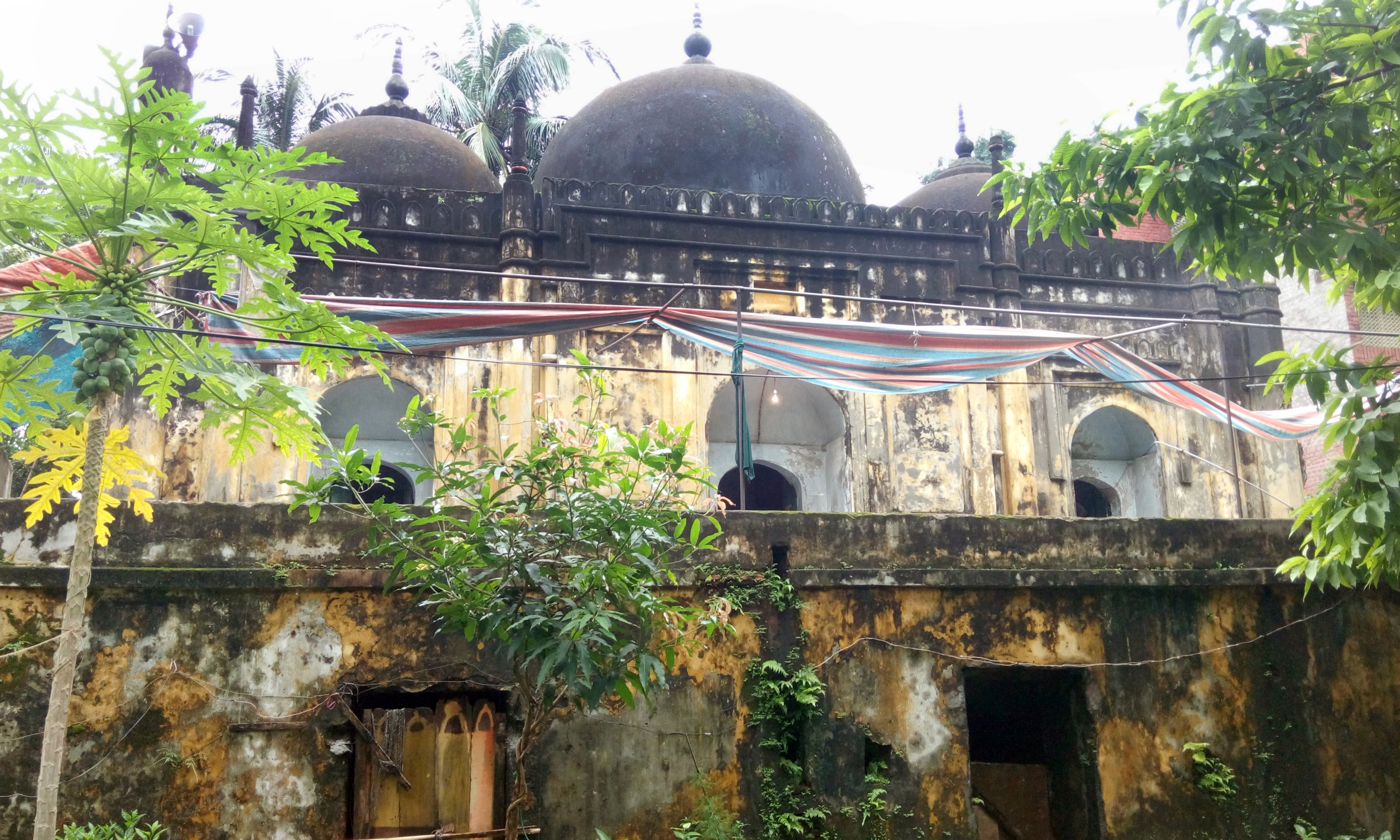 This is the front view of Mosque of Musa Kha.